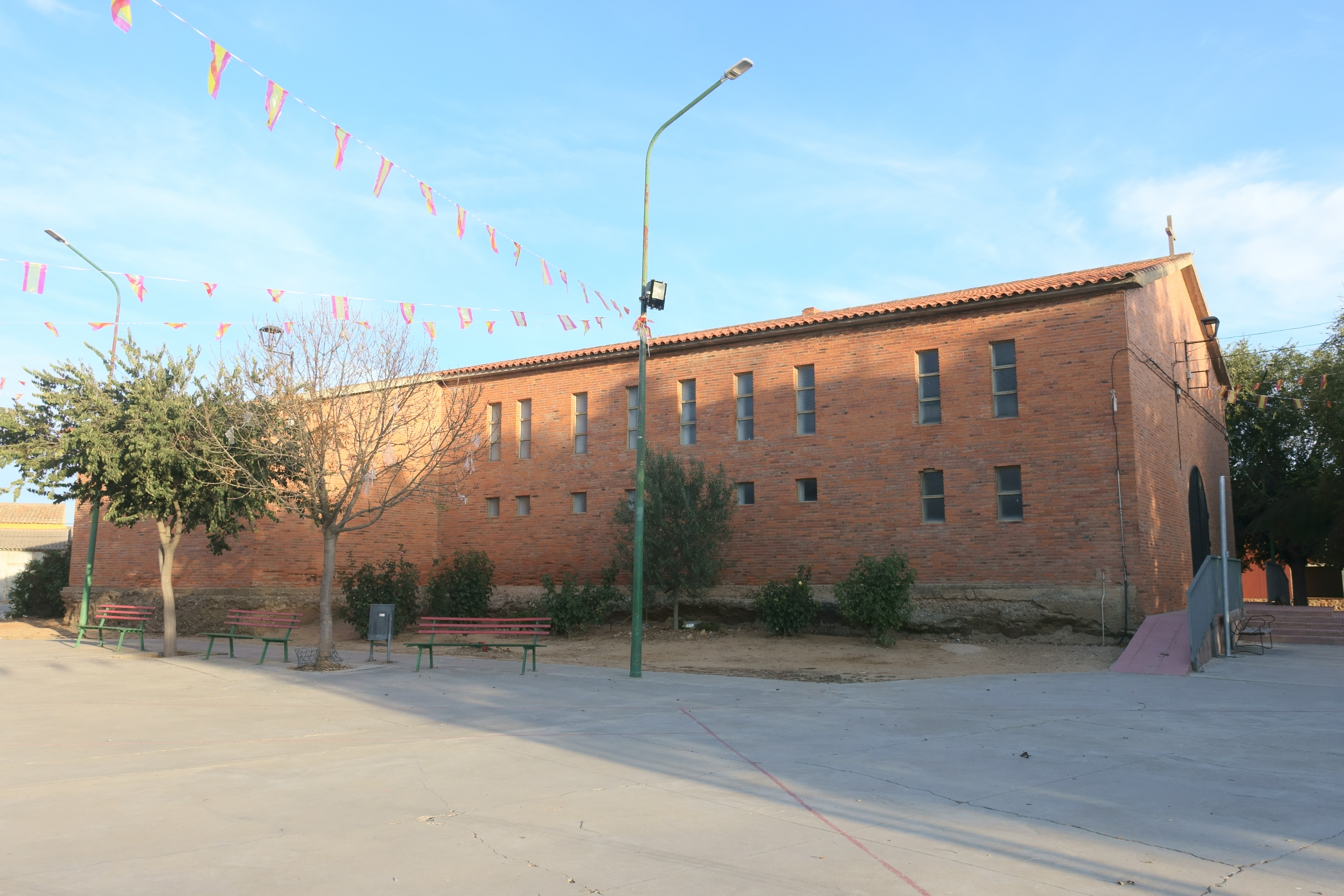 Iglesia de Nuestra Señora de los Rayos, Tapioles (Zamora, España).